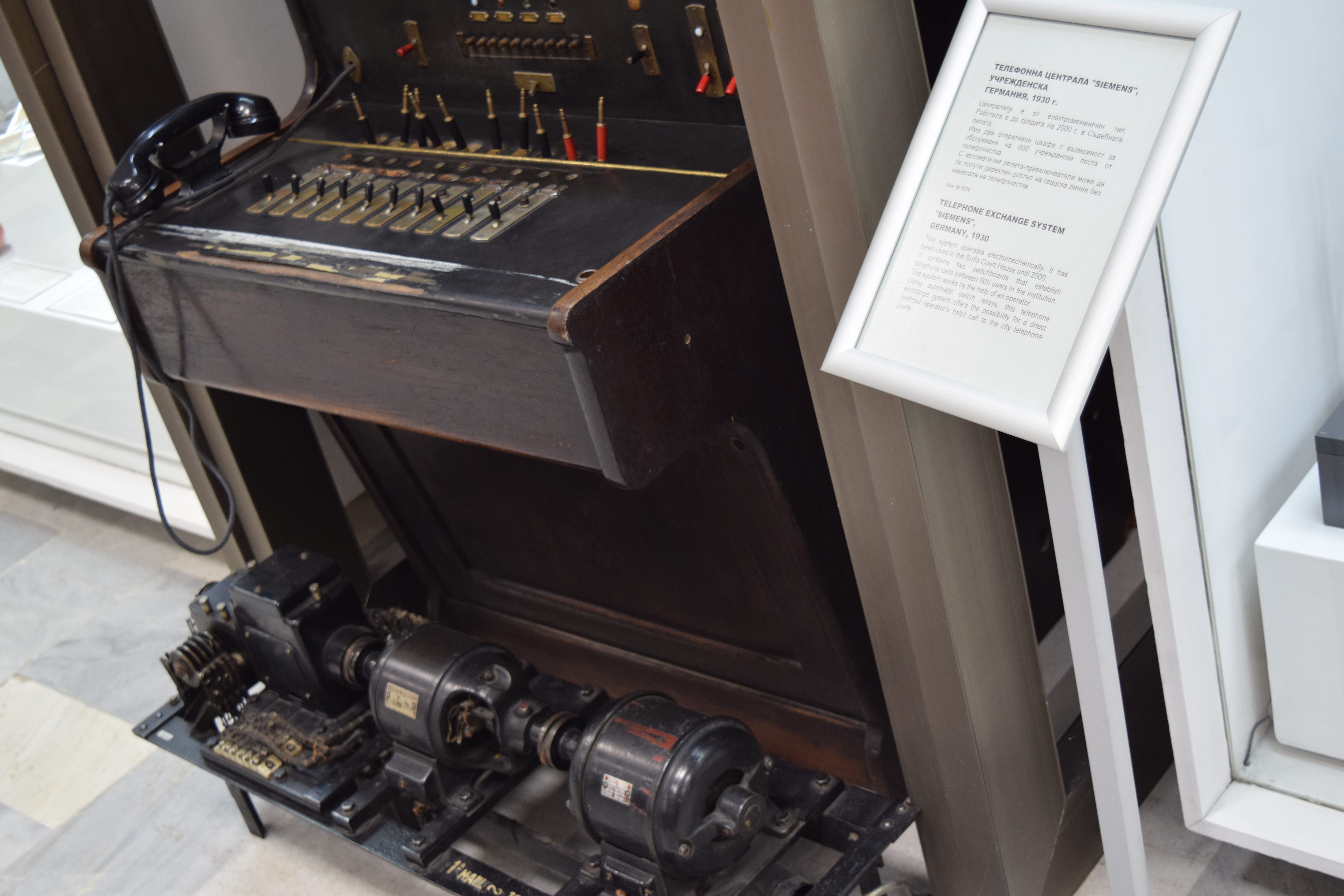 Телефонна централа Сименс, 1930.Експонат от Националния политехнически музей, София